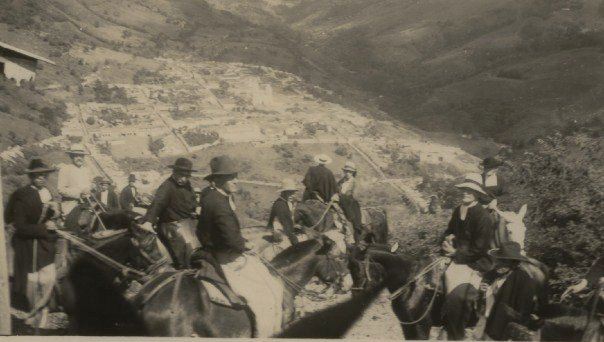 Gramalote Norte de Santander, Colombia. Foto de los años 40.